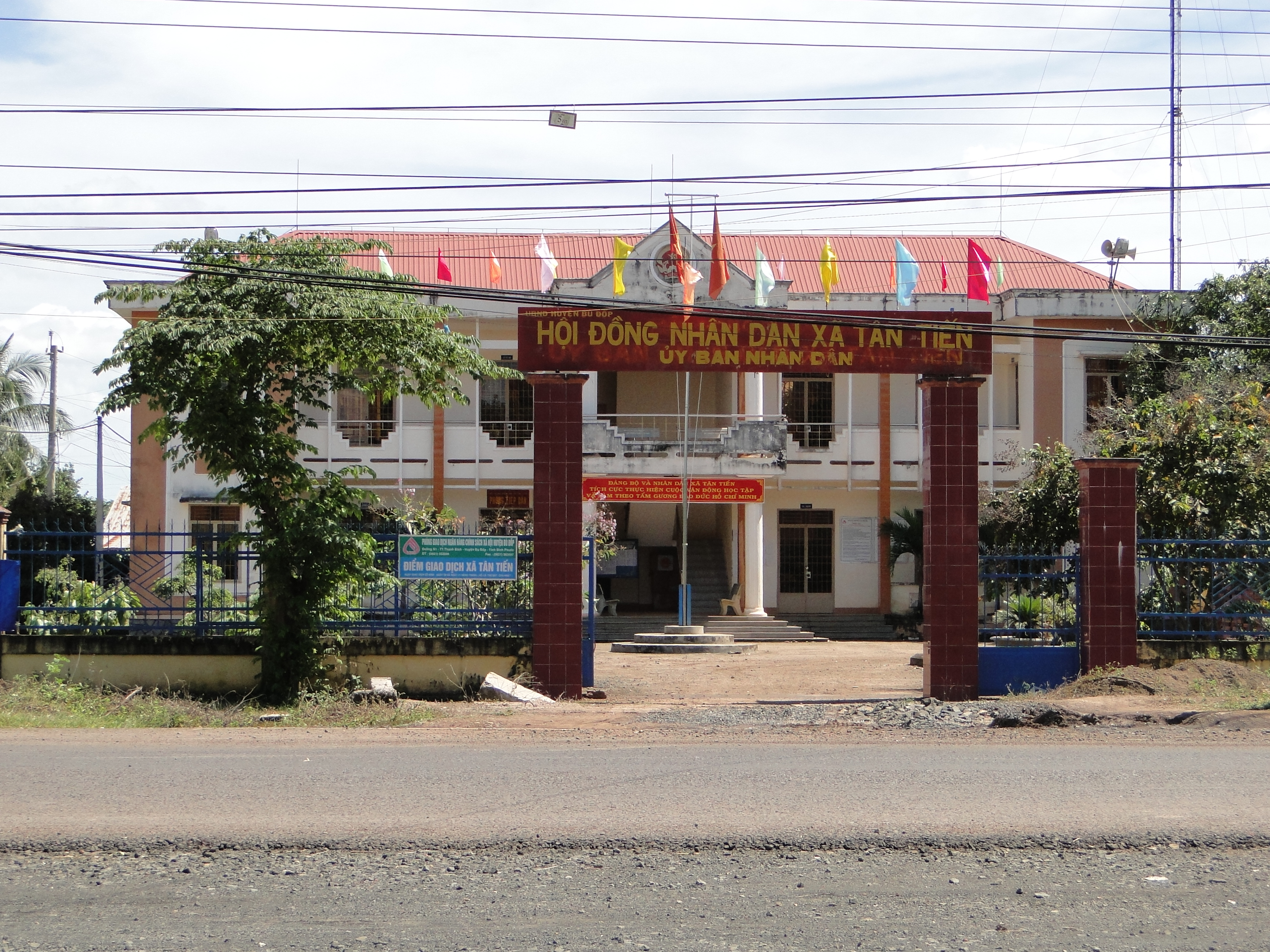 Bù Đốp, Binh Phuoc, Vietnam